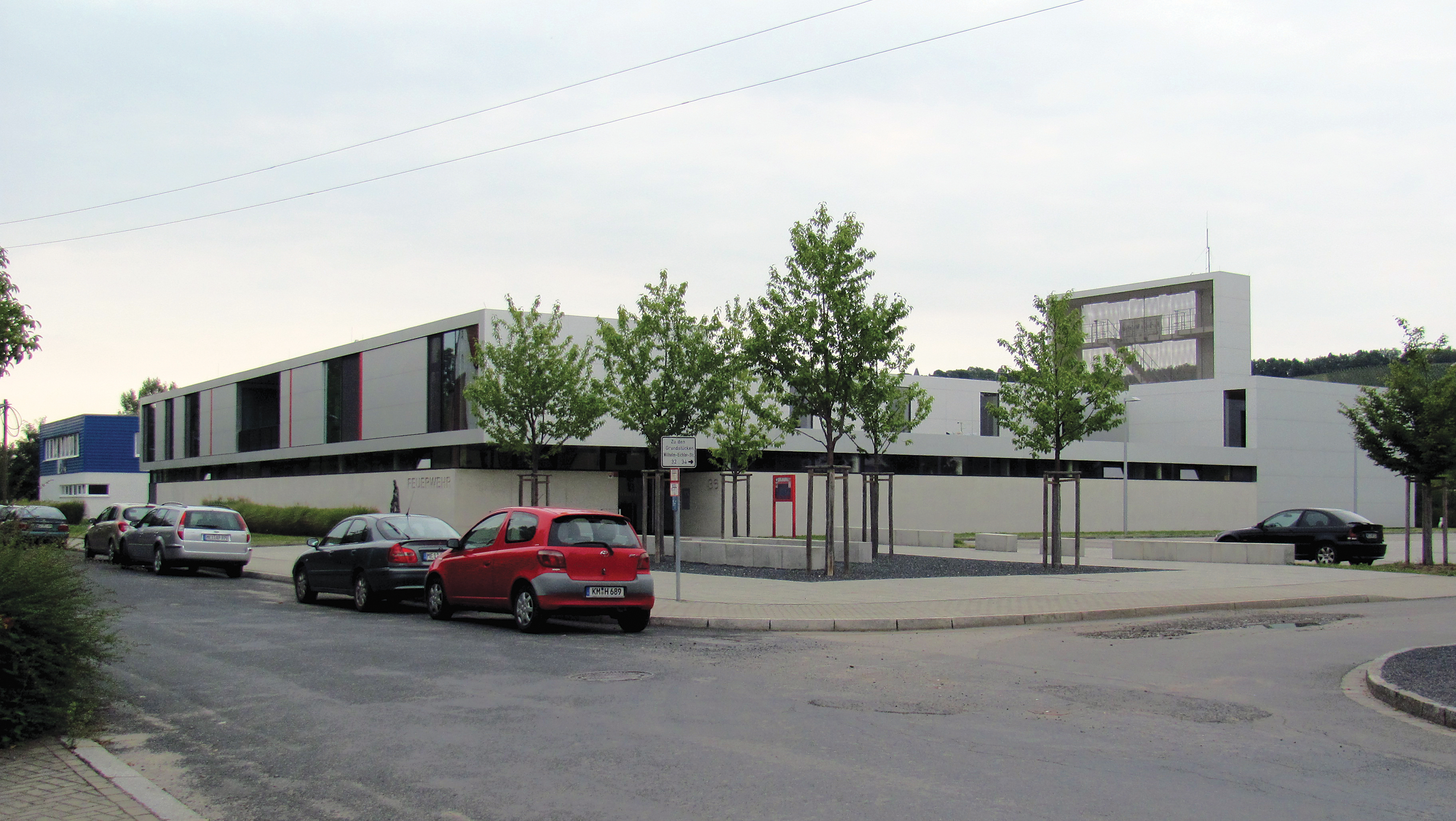 Radebeul, Feuerwache Radebeul-West